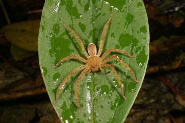 female Pseudopoda spirembolus from Okinawa.